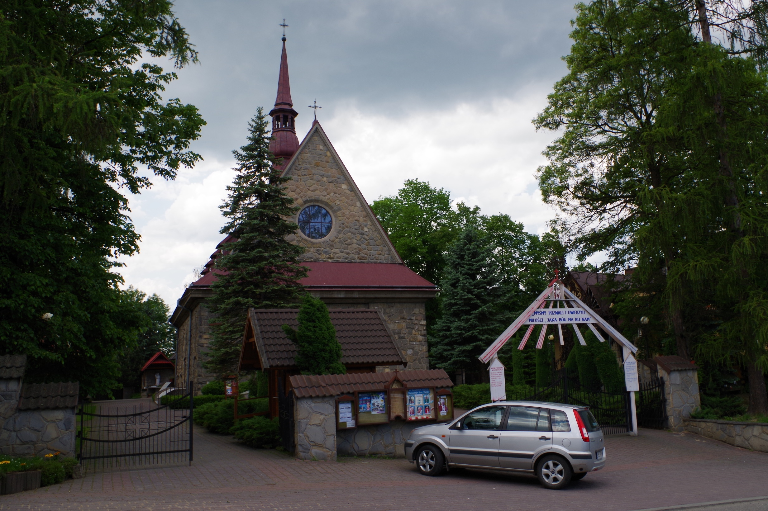 Kościół w Marcinkowicach